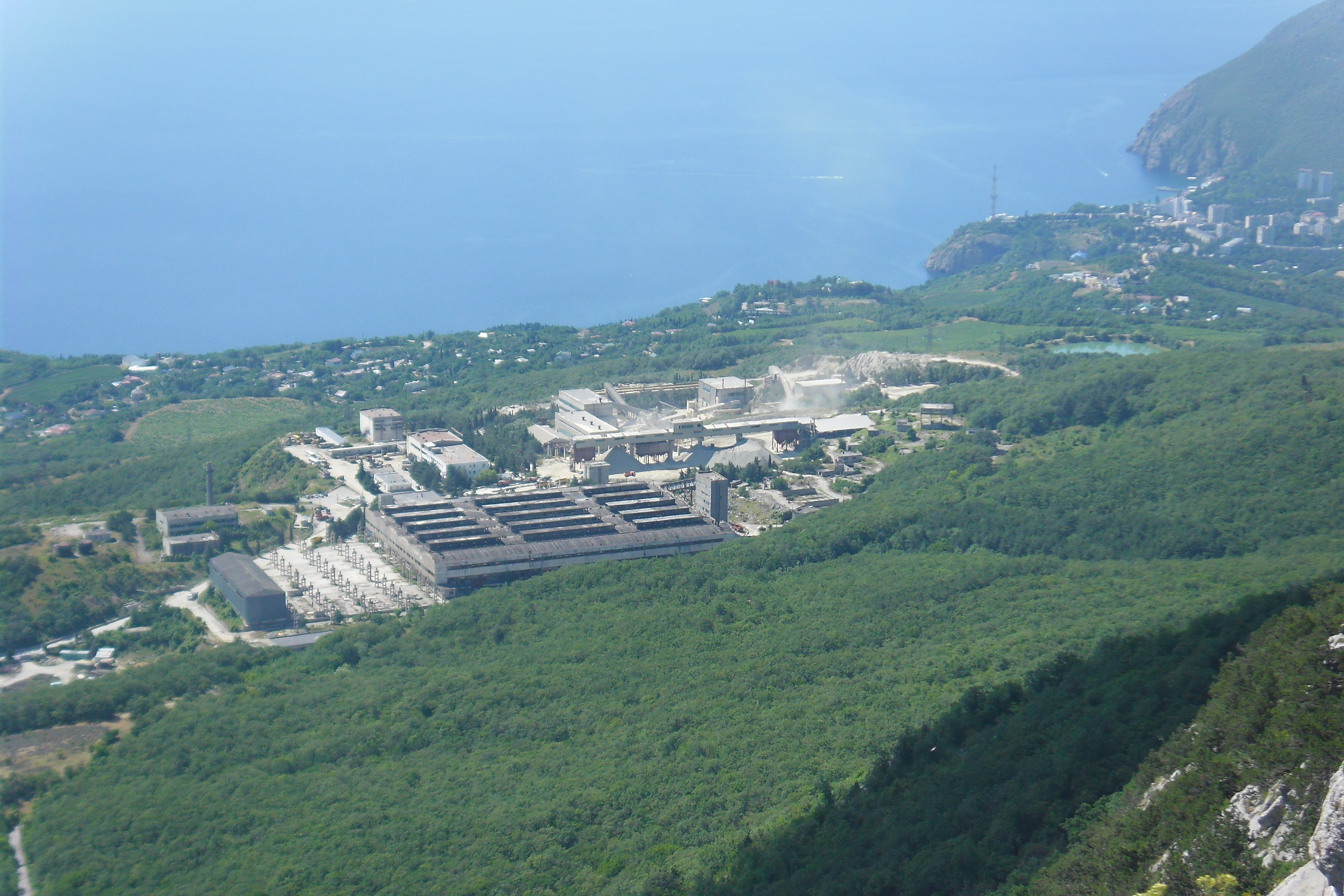 Фото